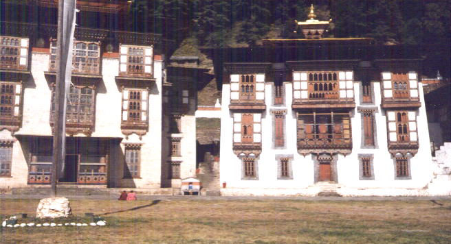 Jakhar City, Kurjey-Lhakang monastery, Bhutan